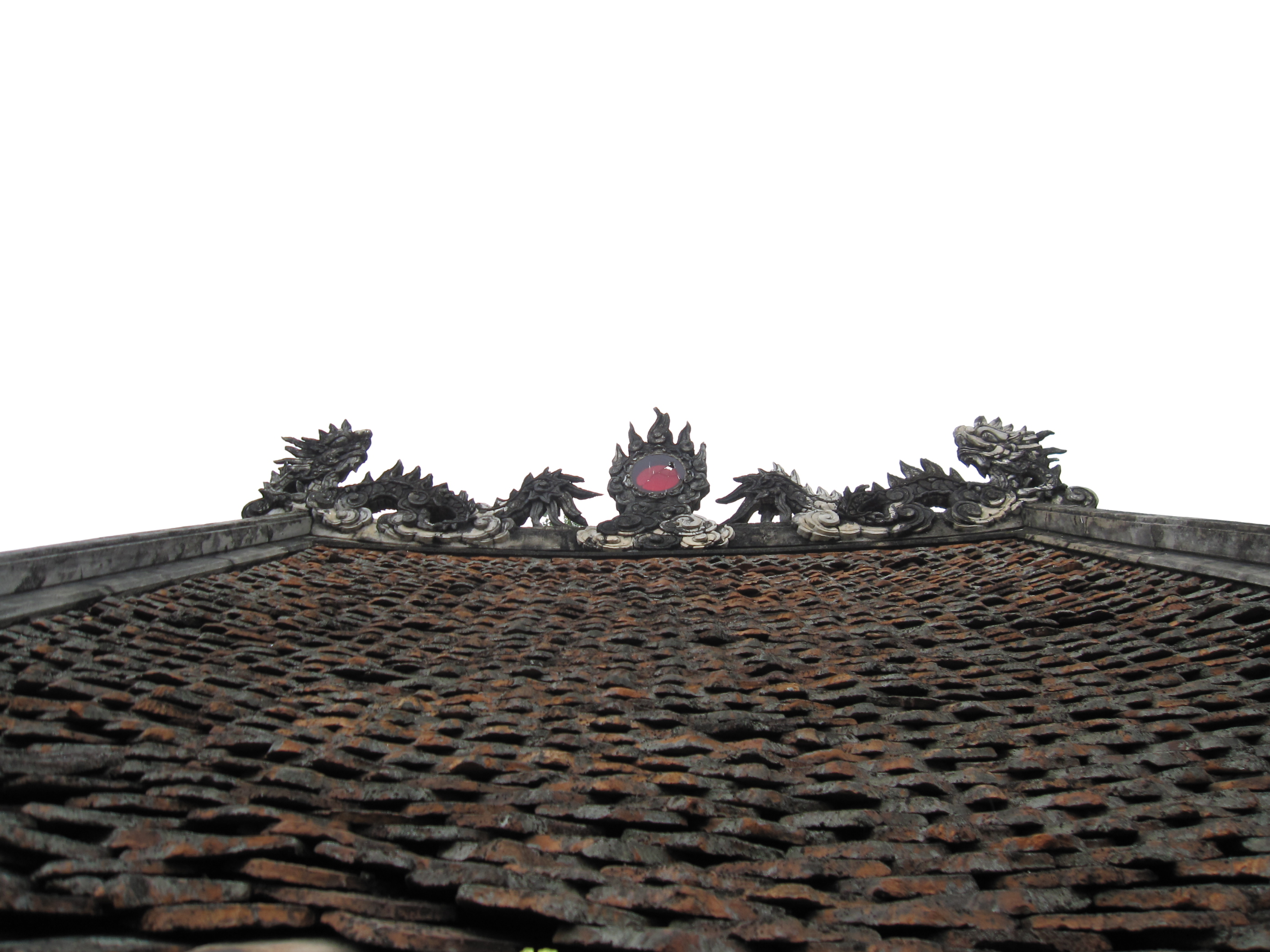 One Pillar Pagoda